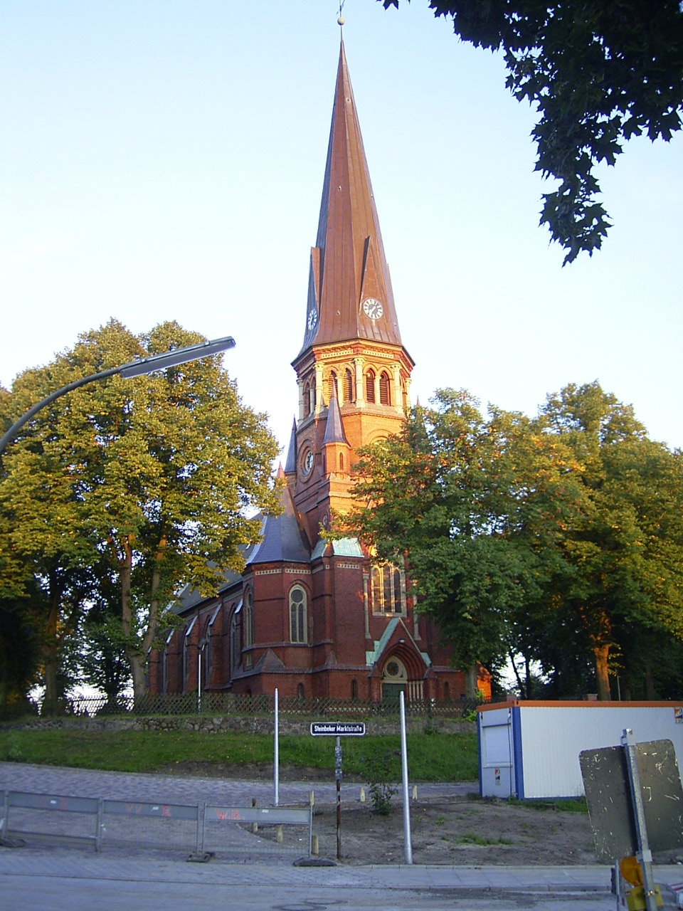 Evangelisch-lutherische Steinbeker Kirche in Hamburg-Billstedt, Architekt: Otto Ritscher.